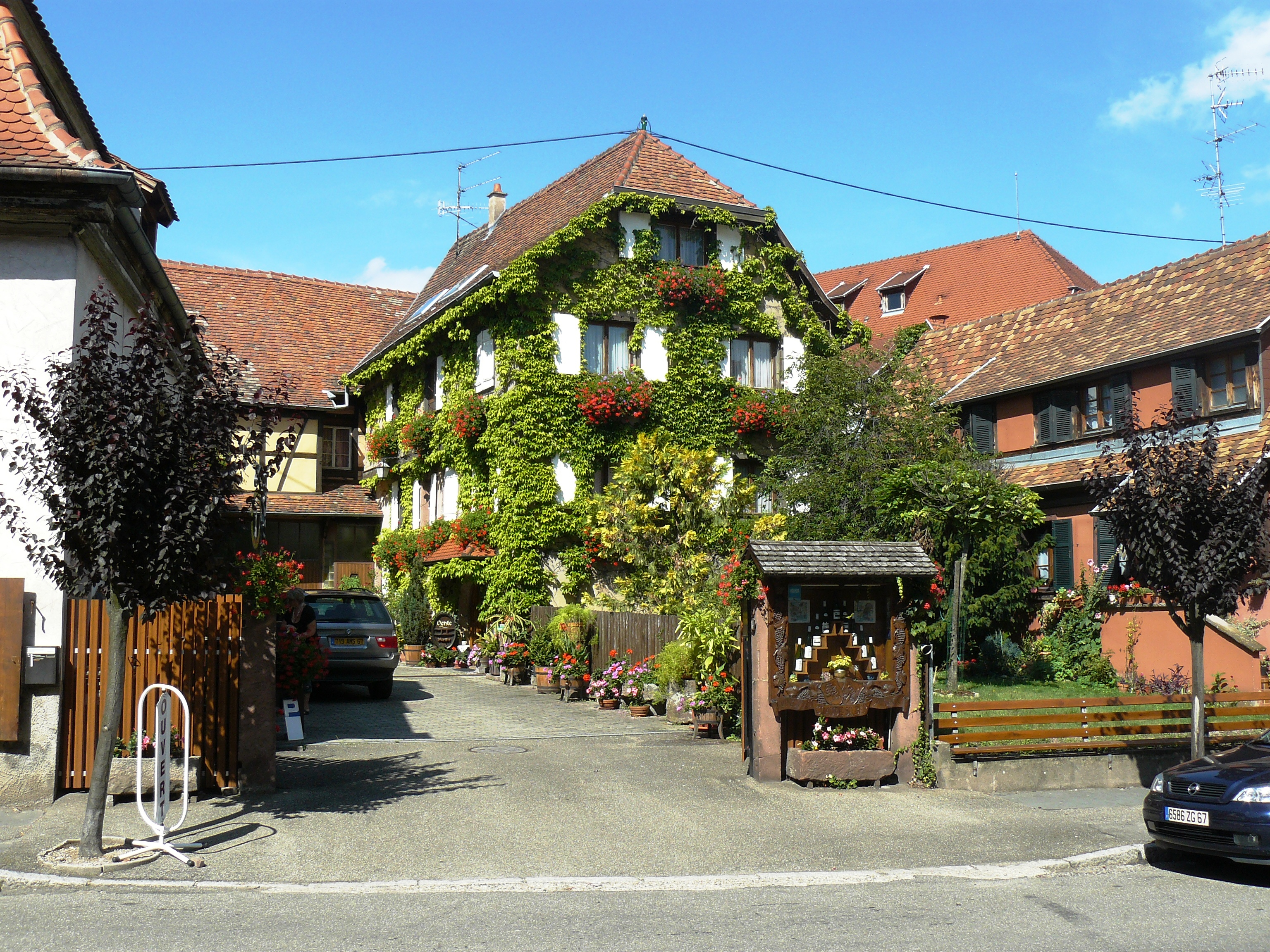 Ancienne maison vigneronne du XVIIIe siècle transformée aujourd'hui en cave viticole